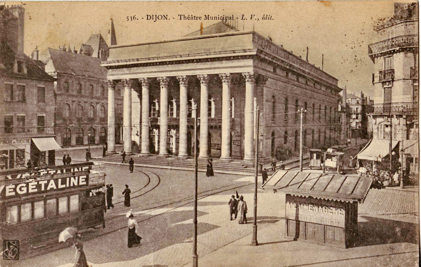 Carte postale ancienne éditée par L. V. édit, n°536 : DIJON - Place du Théâtre